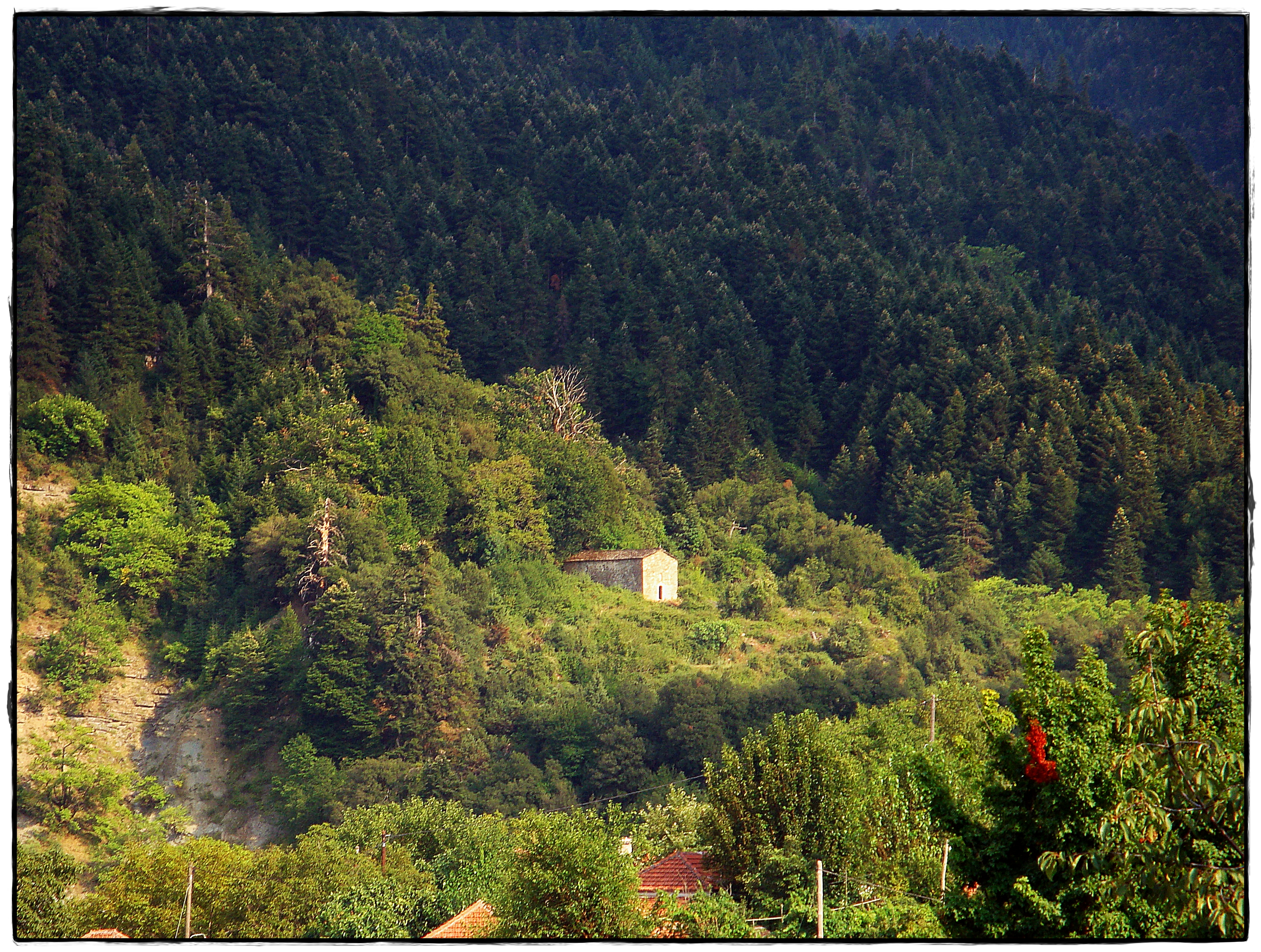 Ιερά Μονή Εισοδίων Θεοτόκου